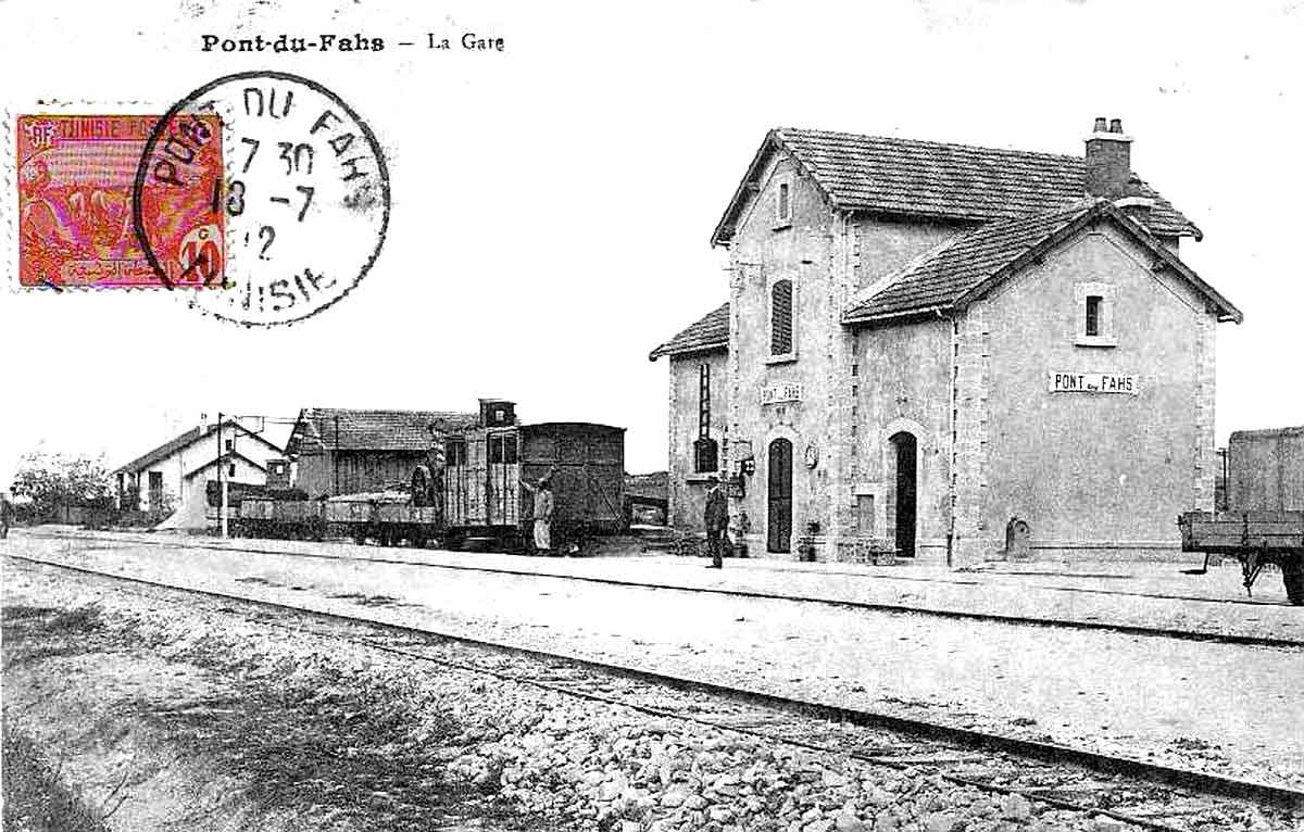 Gare de Pont du Fahs vers 1910